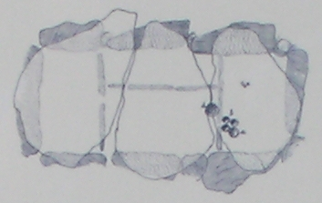 Ausschnitt der Schautafel vor Ort: Zeichnung des Grabes mit Fundstücken von 1911. Quelle: Mitteilungen des Anthropologischen Vereins 1911, Heft 19, 20-25 Auch in Achäologisches Landesamt Schleswig-Holstein; C.Rothmann, Die Grabkammer mit dem Schalenstein bei Bunsoh in Dithmarschen.